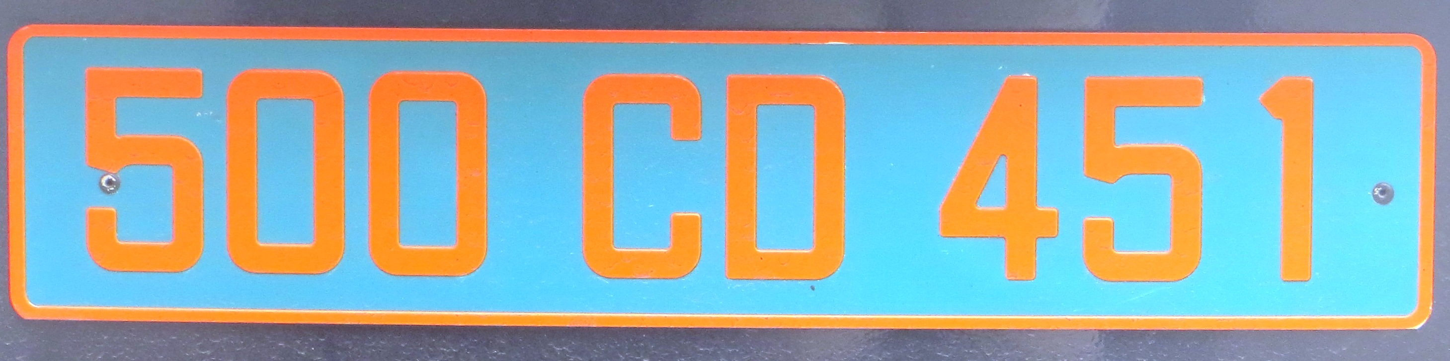 Frans CD plaat